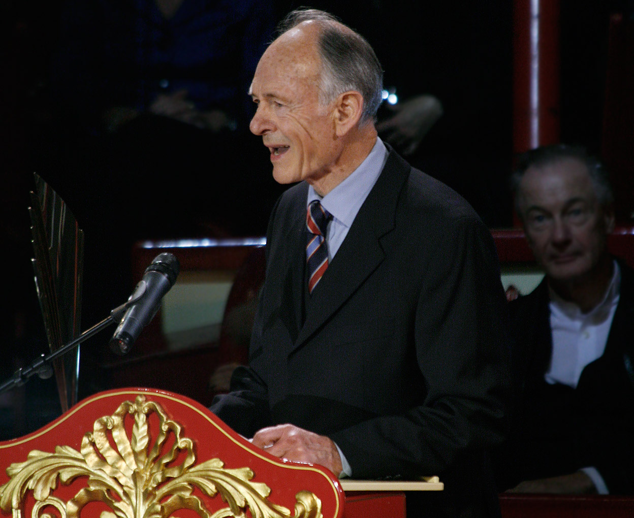 Joachim Bißmeier während der Laudatio für Roland Schimmelpfennig im Rahmen der Verleihung des Nestroy-Theaterpreises 2009 (Circus Roncalli auf dem Wiener Rathausplatz).